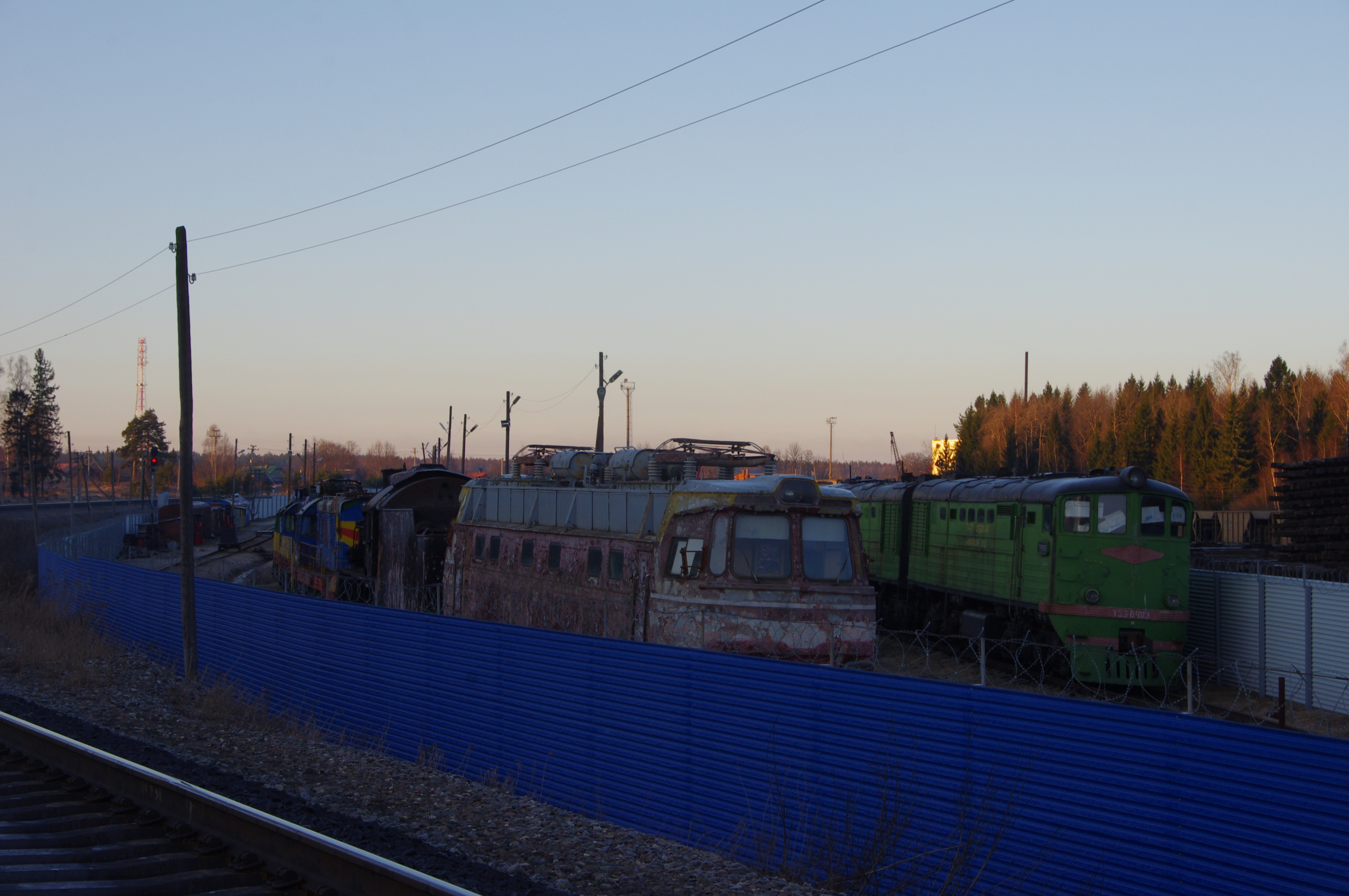 База запаса локомотивов близ станции Ермолино, Ивановская область, Россия. На переднем плане - электровоз ЧС4-031 и тепловоз ТЭ3-6403.